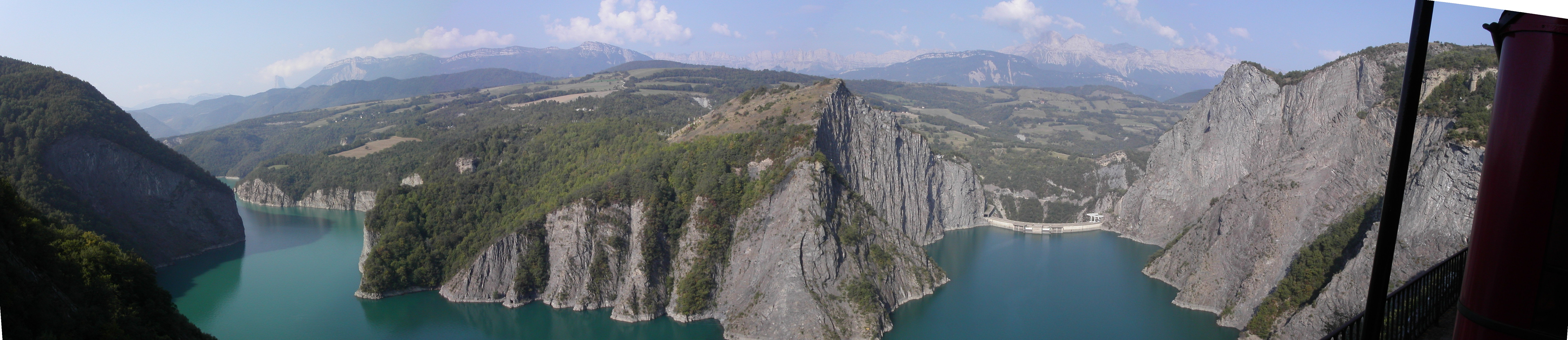 Lac du Monteynard vu depuis le train minier de La Mure Auteur : Utilisateur:Donsez